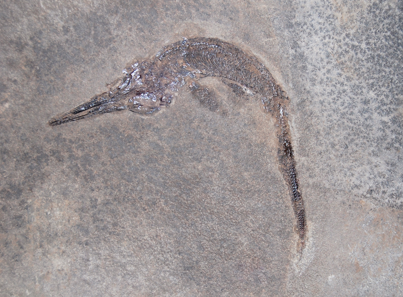 Museo civico di storia naturale Milano